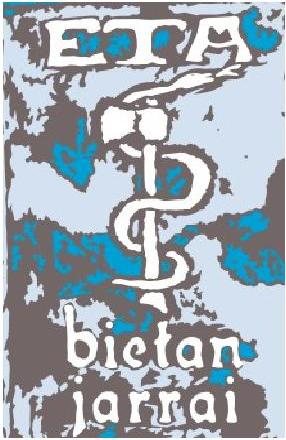 ETAren agiria 2016ko Aberri Egunean